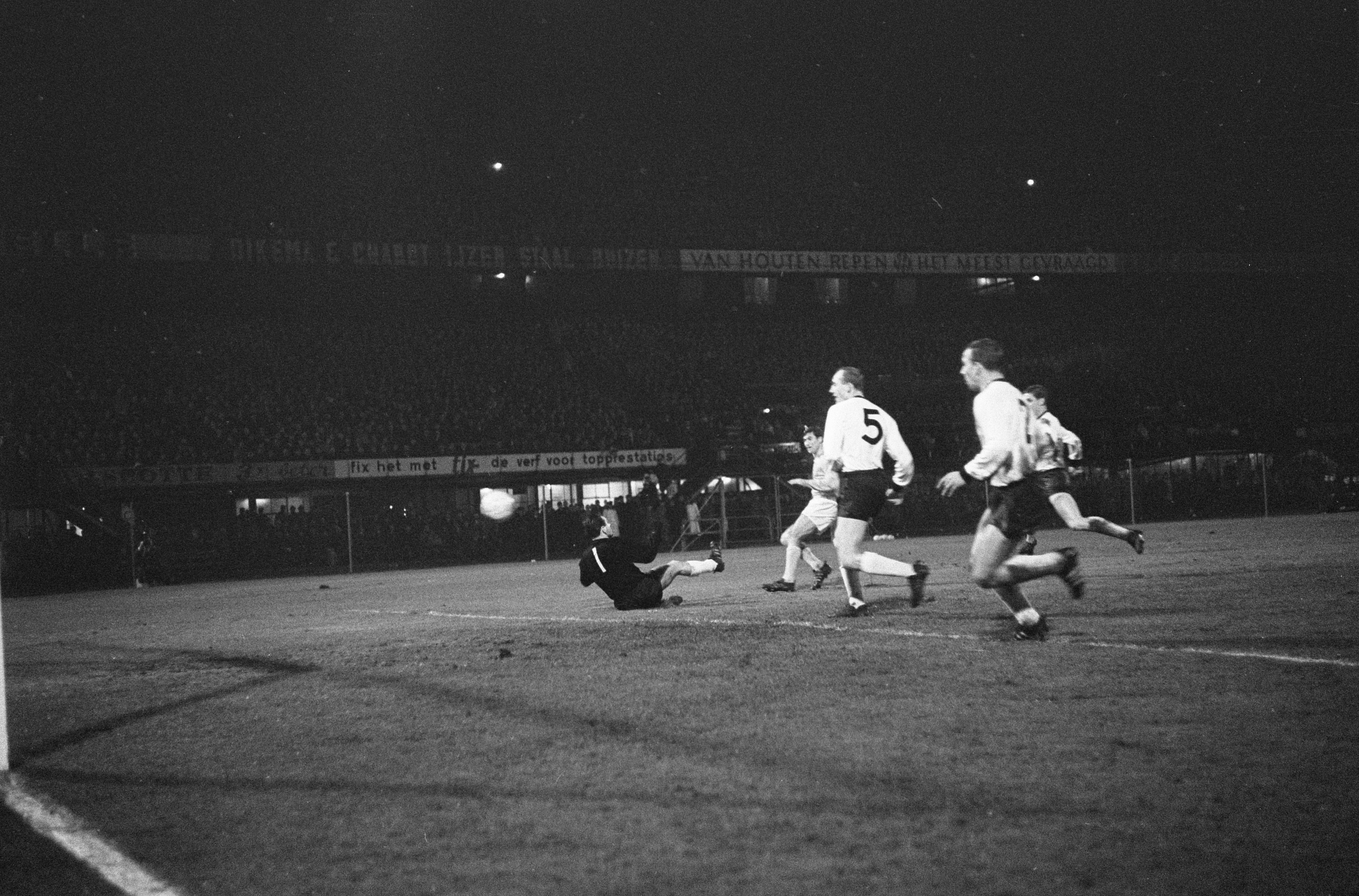 Collectie / Archief : Fotocollectie Anefo Reportage / Serie : [ onbekend ] Beschrijving : Nederland tegen West-Duitsland 2-4, eerste Nederlandse doelpunt, v.l.n.r. keeper Bernhard, Swart (scoort), Loren en Hottges Datum : 23 maart 1966 Trefwoorden : sport, voetbal Persoonsnaam : Bernhard (prins Nederland), Swart, Sjaak Fotograaf : Koch, Eric / Anefo Auteursrechthebbende : Nationaal Archief Materiaalsoort : Negatief (zwart/wit) Nummer archiefinventaris : bekijk toegang 2.24.01.05 Bestanddeelnummer : 918-9494